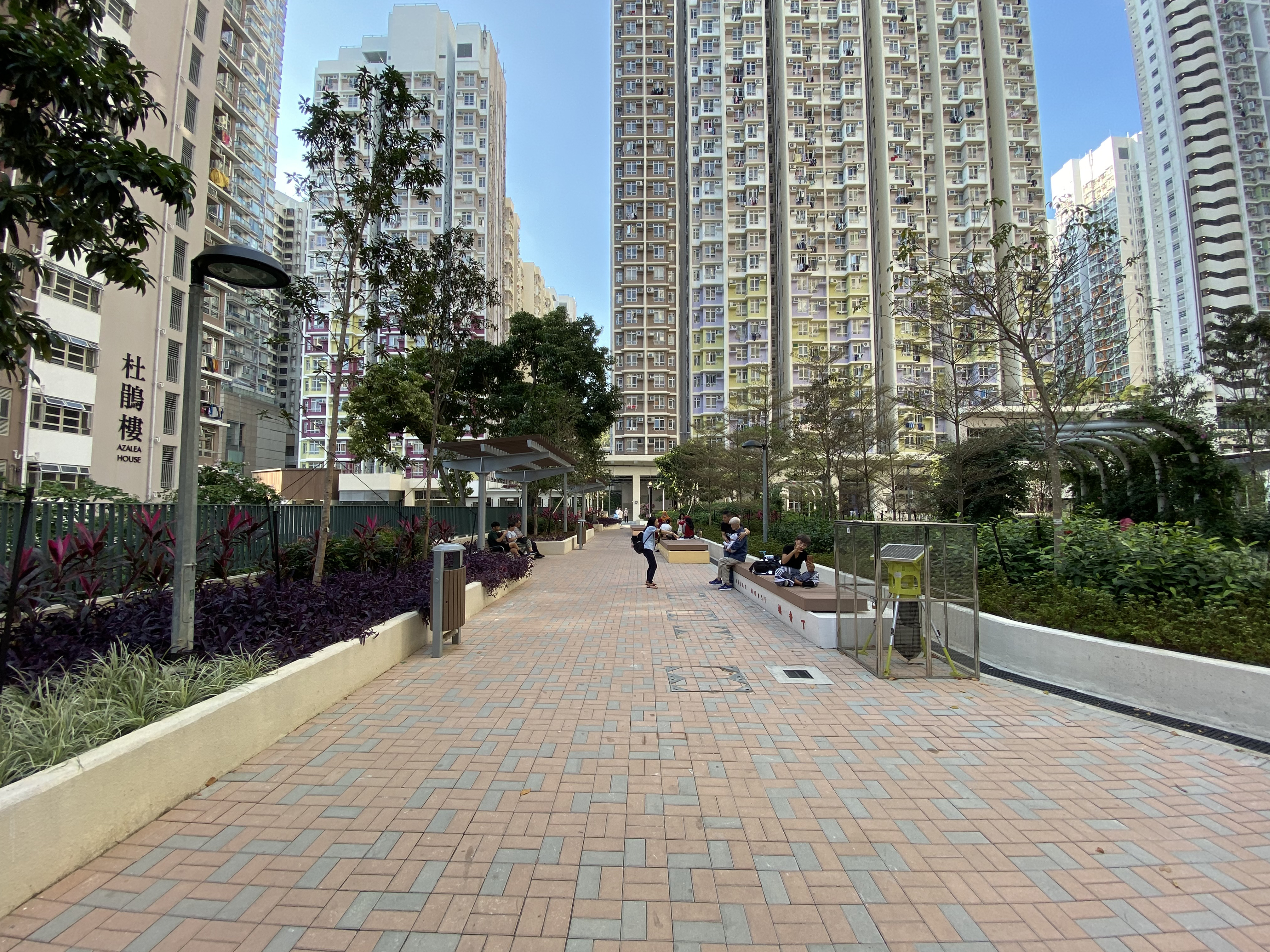 So Uk Estate